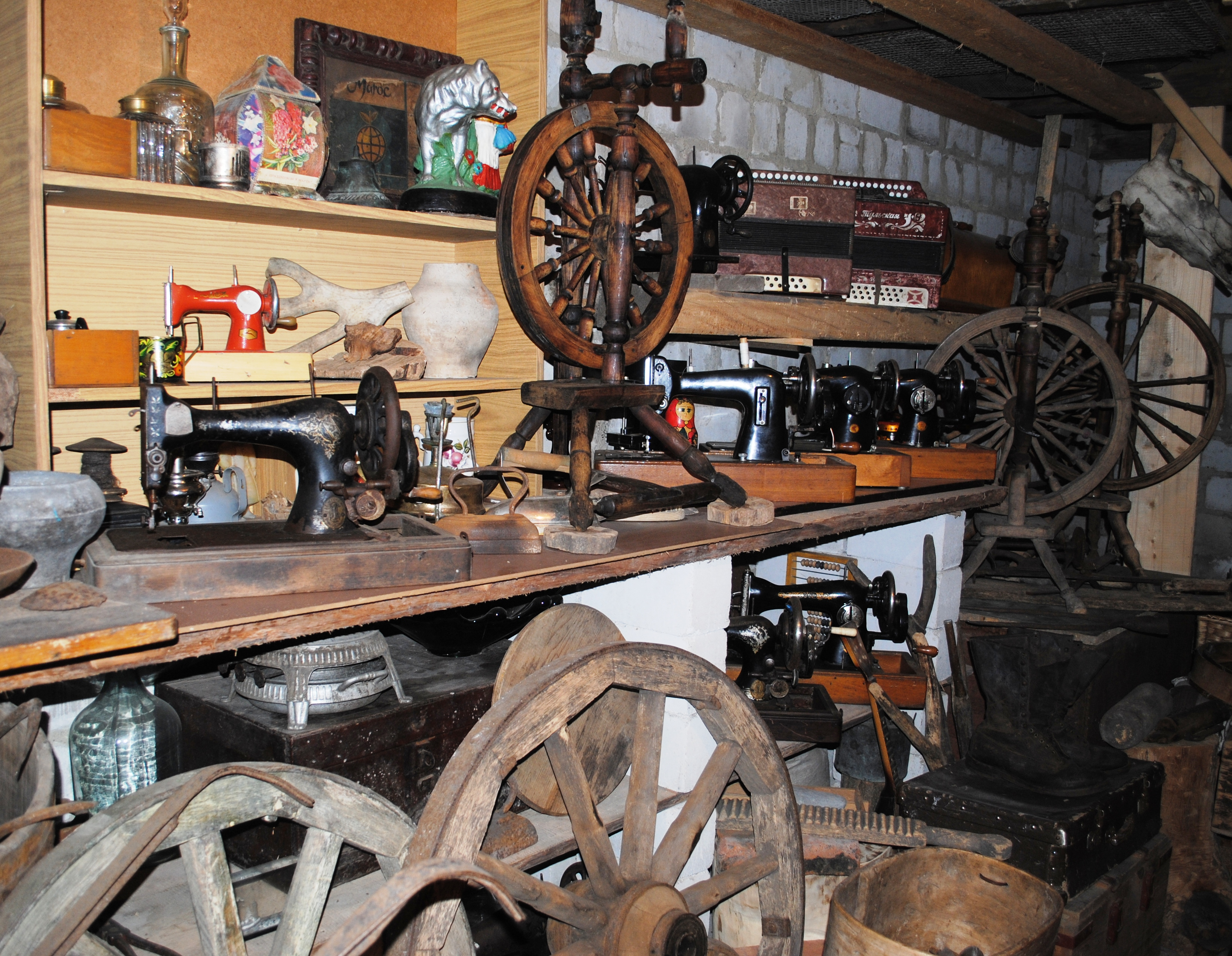 художник Раскат